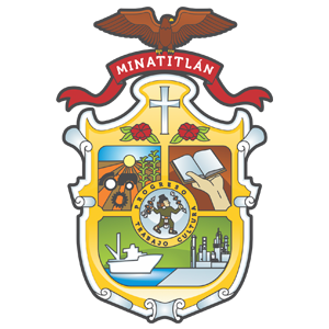 Escudo del municipio de Minatitlán del estado de Veracruz de la república Mexicana.